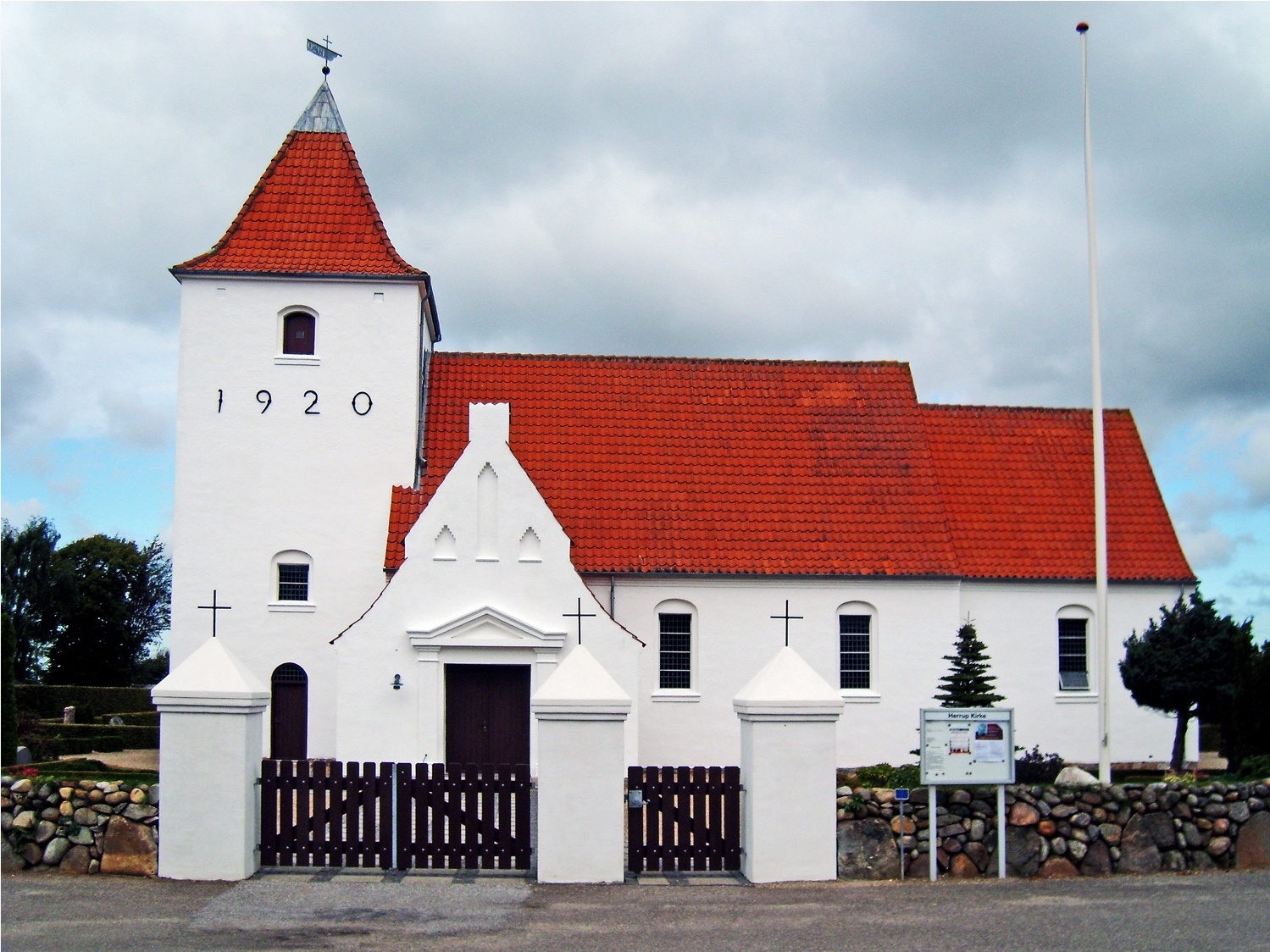 fra syd